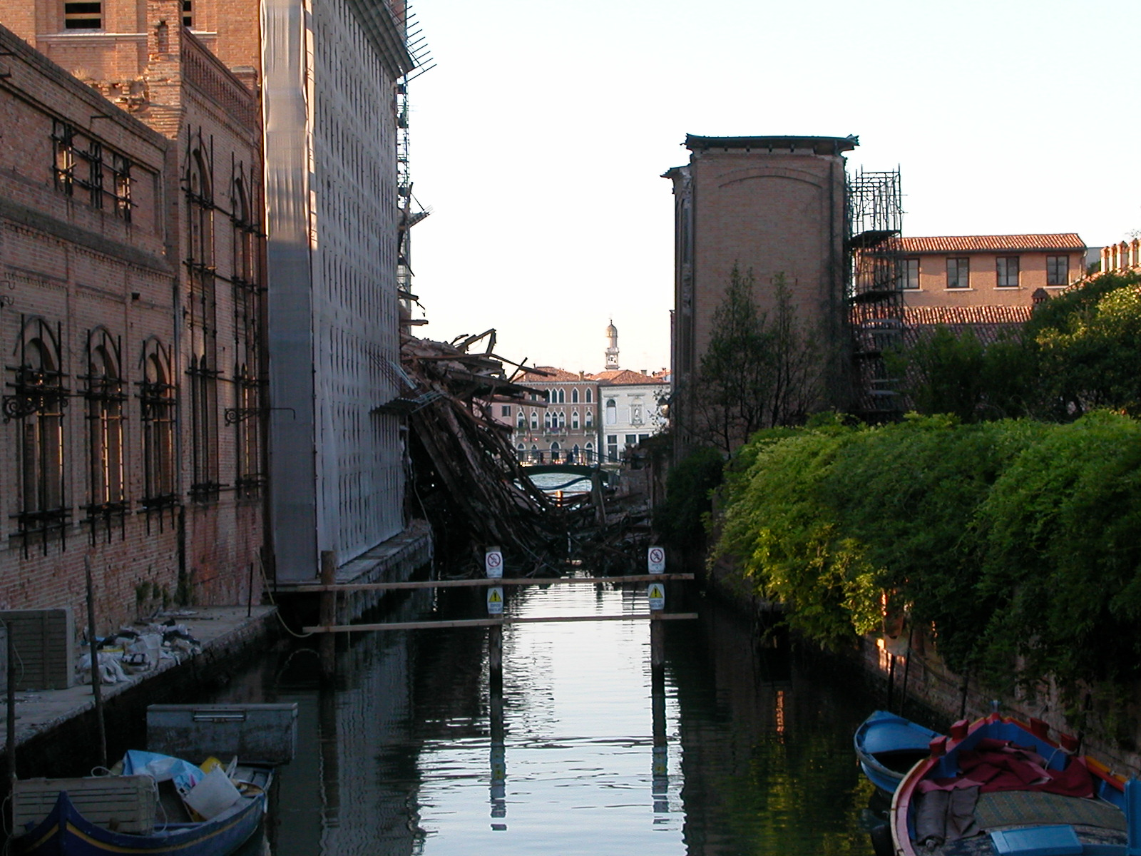 Venezia - Molino Stucky - Parete est dopo il crollo